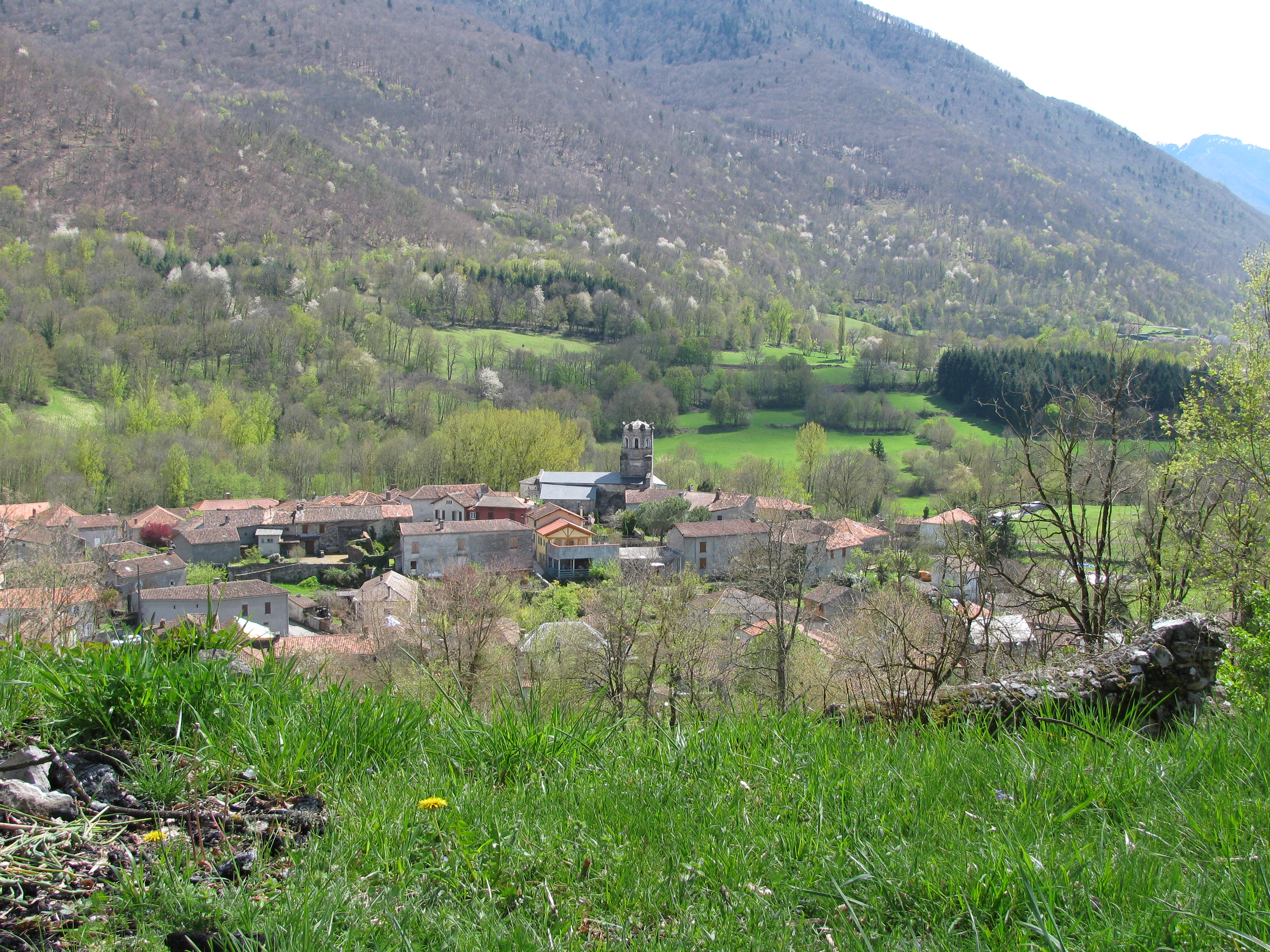 Vue générale du village de Saint-Pé d'Ardet